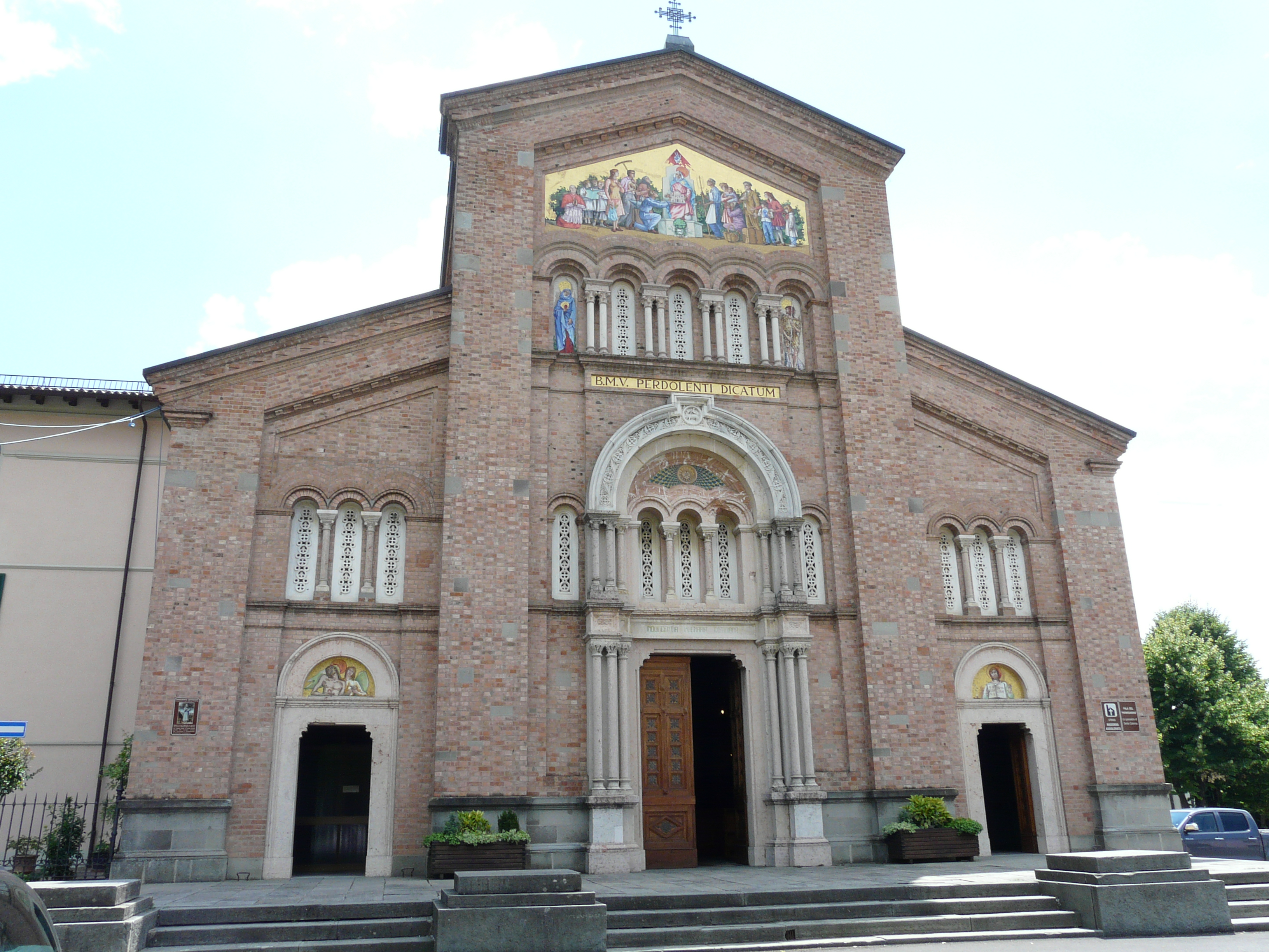 Chiesa di Santa Maria Addolorata di Bardi, Emilia-Romagna, Italia